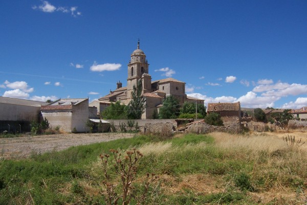 La Iglesia colegiata de Nuestra Señora del Manzano, en Castrojeriz. Punto de paso en el Camino de Santiago.